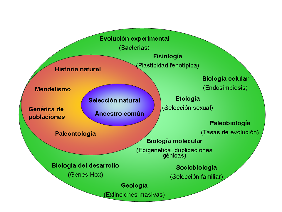 Representación gráfica de la continua expansión de la teoría evolutiva en términos de las ideas, fenómenos estudiados y campos del conocimiento. La elipse más pequeña representa el Darwinismo original, la elipse de tamaño intermedio a la teoría sintética y la más grande a la sintesis ampliada. Esta última integra a por lo menos diez disciplinas científicas adicionales. (Basado en Kutschera, U., Karl J. Niklas. 2004. The modern theory of biological evolution: an expanded synthesis. Naturwissenschaften (2004) 91:255–276 y Pigliucci, M. 2009. An Extended Synthesis for Evolutionary Biology. The Year in Evolutionary Biology 2009: Ann. N.Y. Acad. Sci. 1168: 218–228. New York Academy of Sciences.